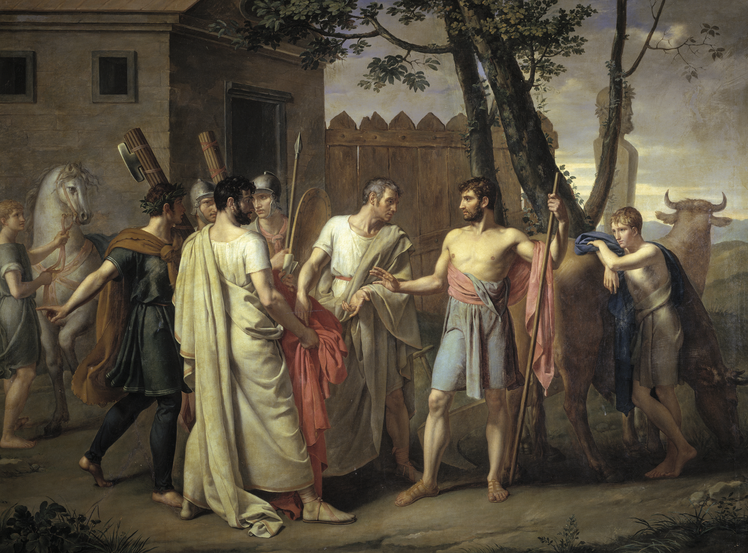 El cuadro representa el momento trascendental en que varios senadores, en representación del pueblo romano, acuden en busca del patricio Lucius Quinctius Cincinnatus, héroe dedicado a la labranza, para nombrarle dictador de Roma y pedirle que haga frente a los pueblos que amenazaban la ciudad. Cincinato había sido nombrado cónsul el 460 a.C. y después sería designado dictador de Roma en dos ocasiones, en 458 a.C. y 439 a.C., regresando a sus labores en su hacienda junto al río Tíber tras restablecer la paz. Este argumento de la Antigüedad clásica fue evocado con cierta frecuencia por el arte europeo desde el Barroco como ejemplo de honradez y ética política, exaltación de la falta de ambición y apego al poder del buen gobernante y justificación teórica de los regímenes absolutos y las dictaduras temporales para reinstaurar el orden de las naciones en tiempos de caos.